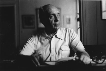 Juan Alberto Montes en Buenos Aires, 1984